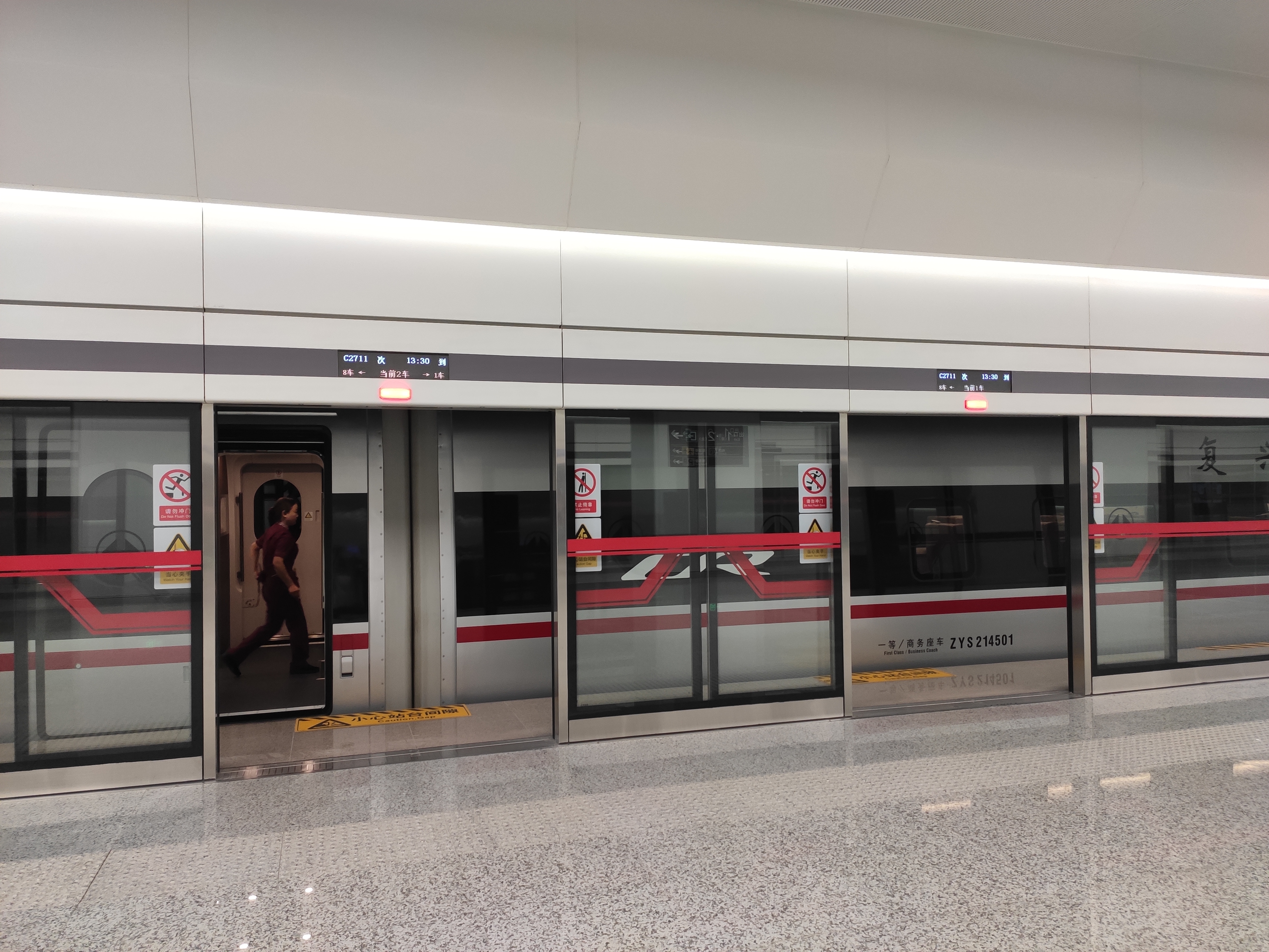 我国细心的工程师已经考虑到我国高铁大量不通用车门位置尺寸的解决方案了——我们不搞门对门的屏蔽门不就完了么！